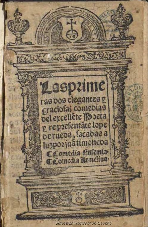 Las primeras dos elegantes y graciosas comedias del excelle[n]te Poeta y representa[n]te lope de rueda sacadas a luz por jua[n] timoneda. Comedia Eufemia. Comedia Armelina. [Las segu[n]das dos Comedias del excellente poeta, y representante Lope de rueda agora nueuamente sacadas a luz por jua[n] Timoneda. Comedia d[e]los engaños. Comedia Medora. Los colloquios pastoriles de muy agraciada y apazible prosa, co[m]puestos por el, excelente poeta y gracioso representa[n]te Lope d[e]Rueda, sacados a luz por Juan Timoneda. Colloquio de Camila. Colloquio de Tymbria] Autor: Rueda, Lope de (ca. 1505-1565) ; Timoneda, Juan de Fecha: 1576 Datos de edición: Seuilla En casa de Alonso de la Barrera